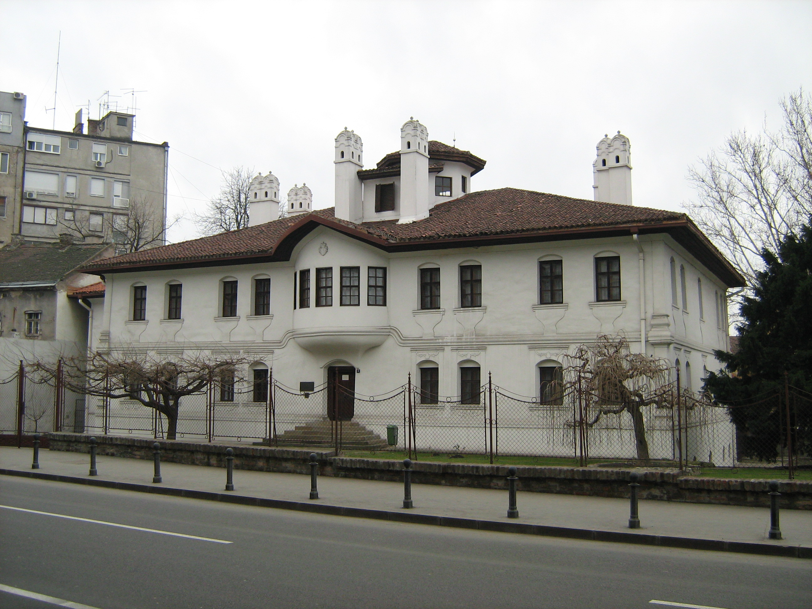 Countess Ljubica's Residence